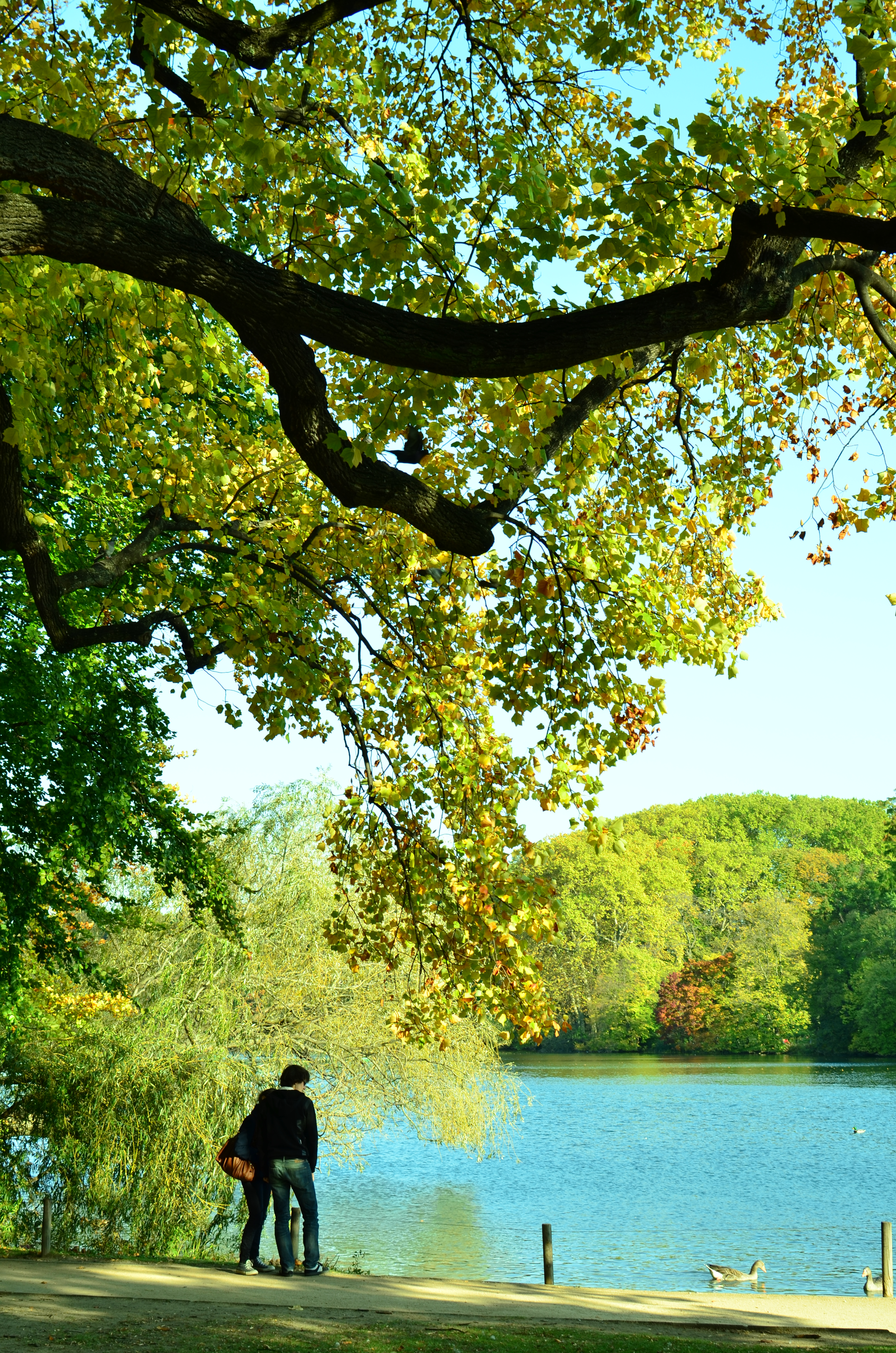 Lyon - Parc de la Tête d'Or - promenade au bord du lac